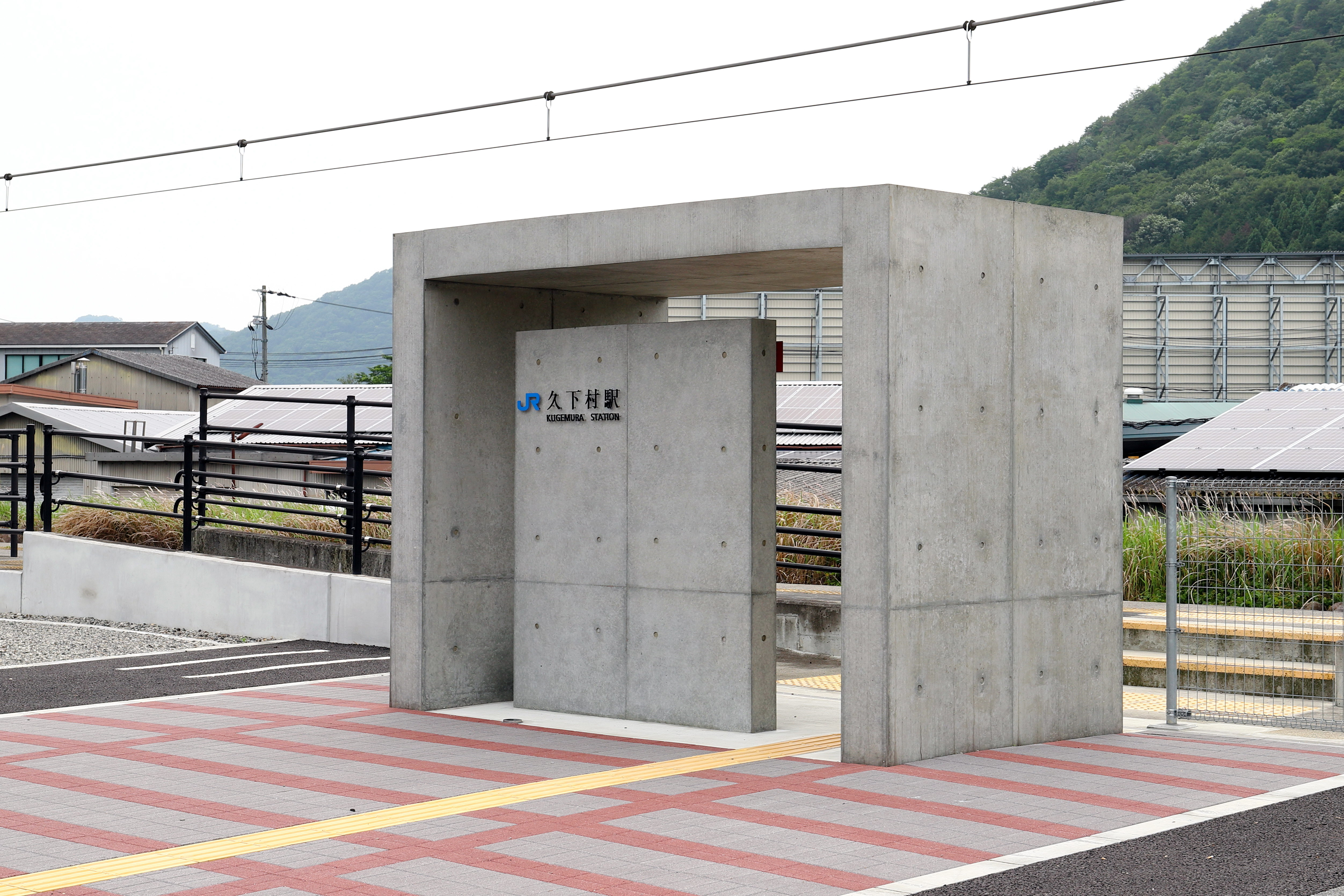 2019年改築後の駅舎 Canon EOS 6D Mark II